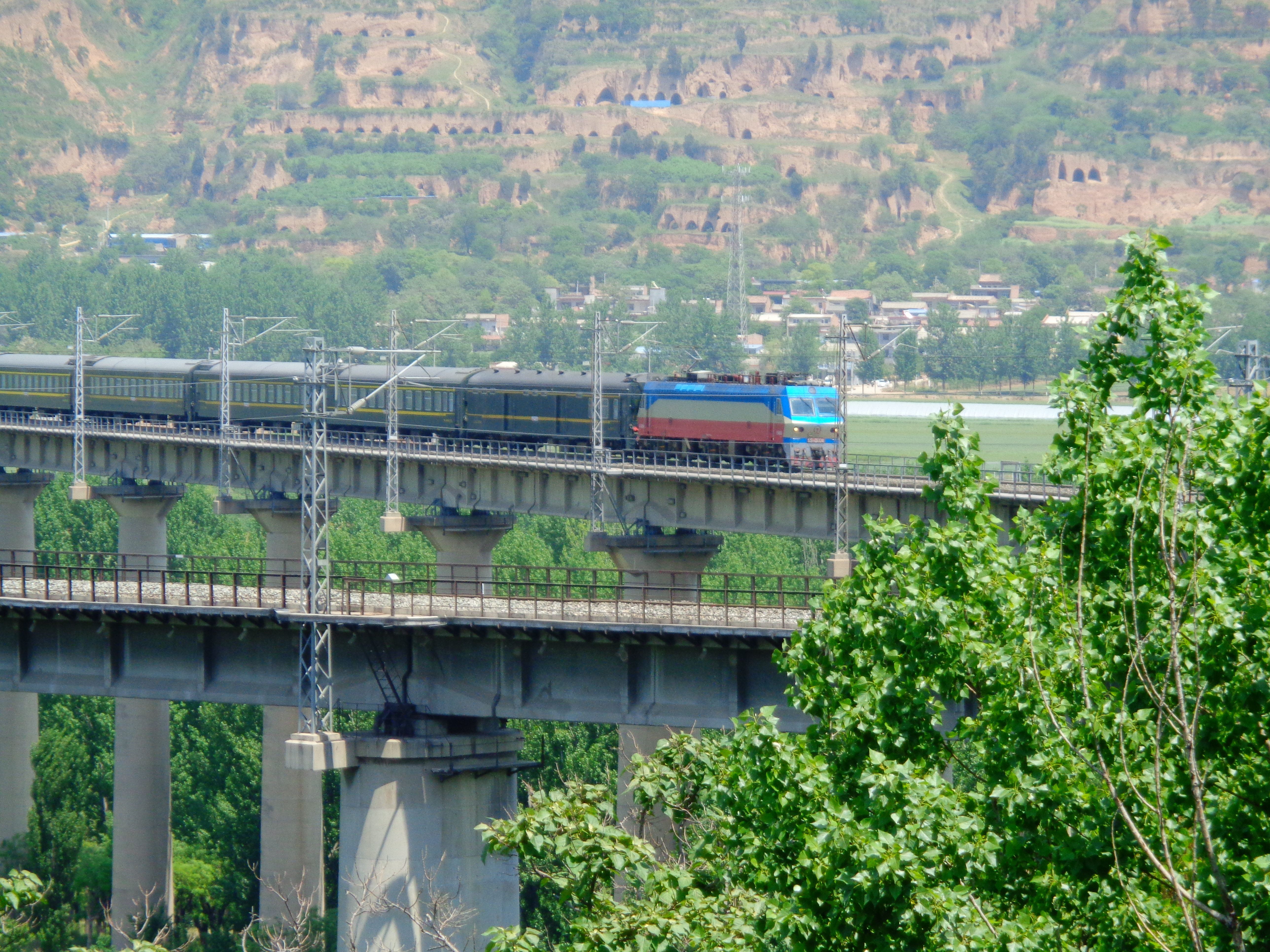 西安市长安区一列车通过西康铁路灞河桥